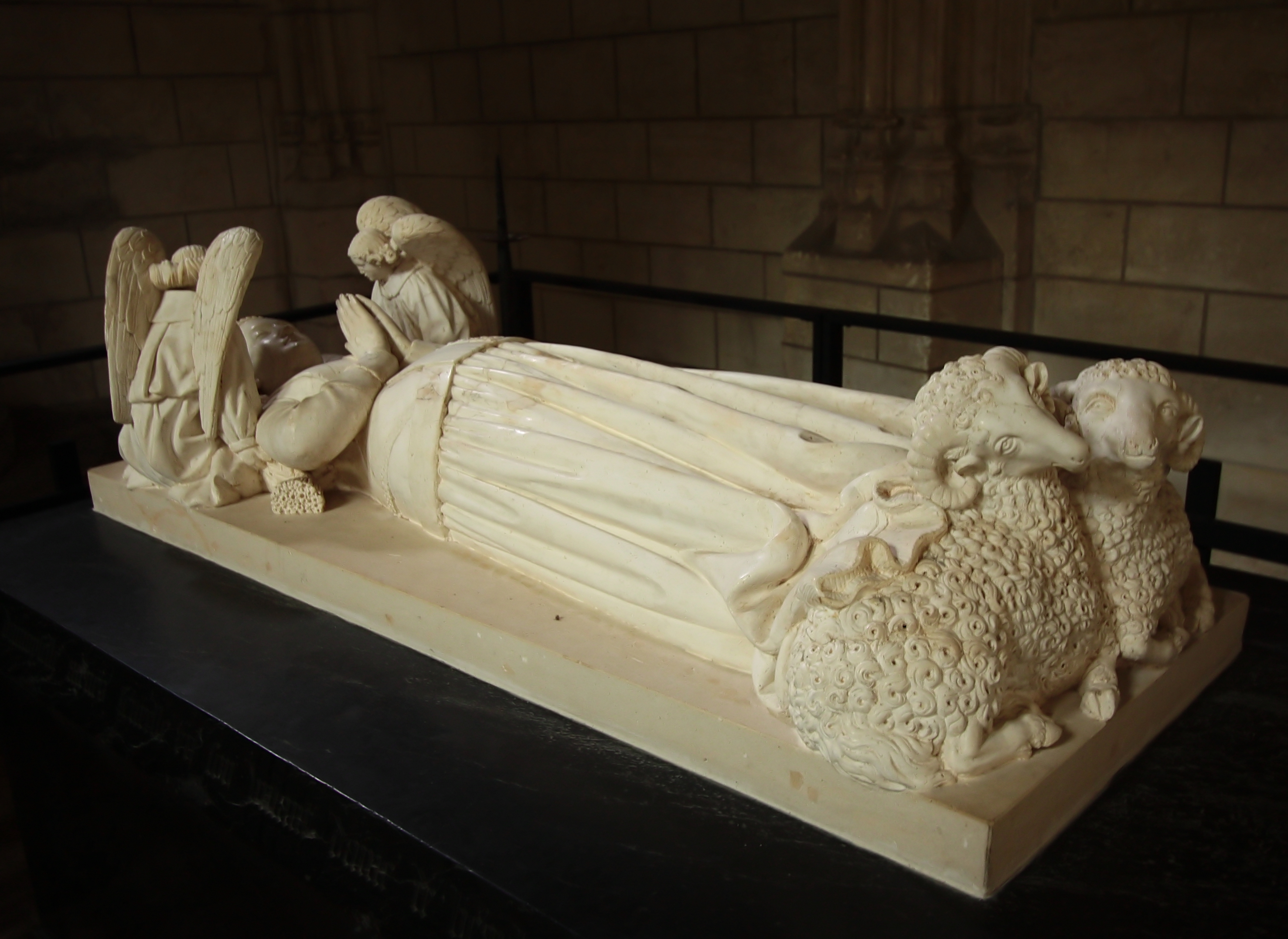 Loches/Frankreich - Das Grabmal Agnès Sorels, hier in der Stiftskirche Saint-Ours.